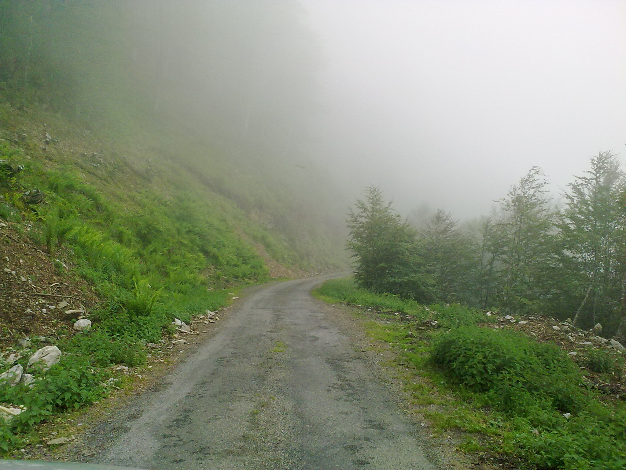 Route au Col de Spandelles (Haute-Pyrénées, France).